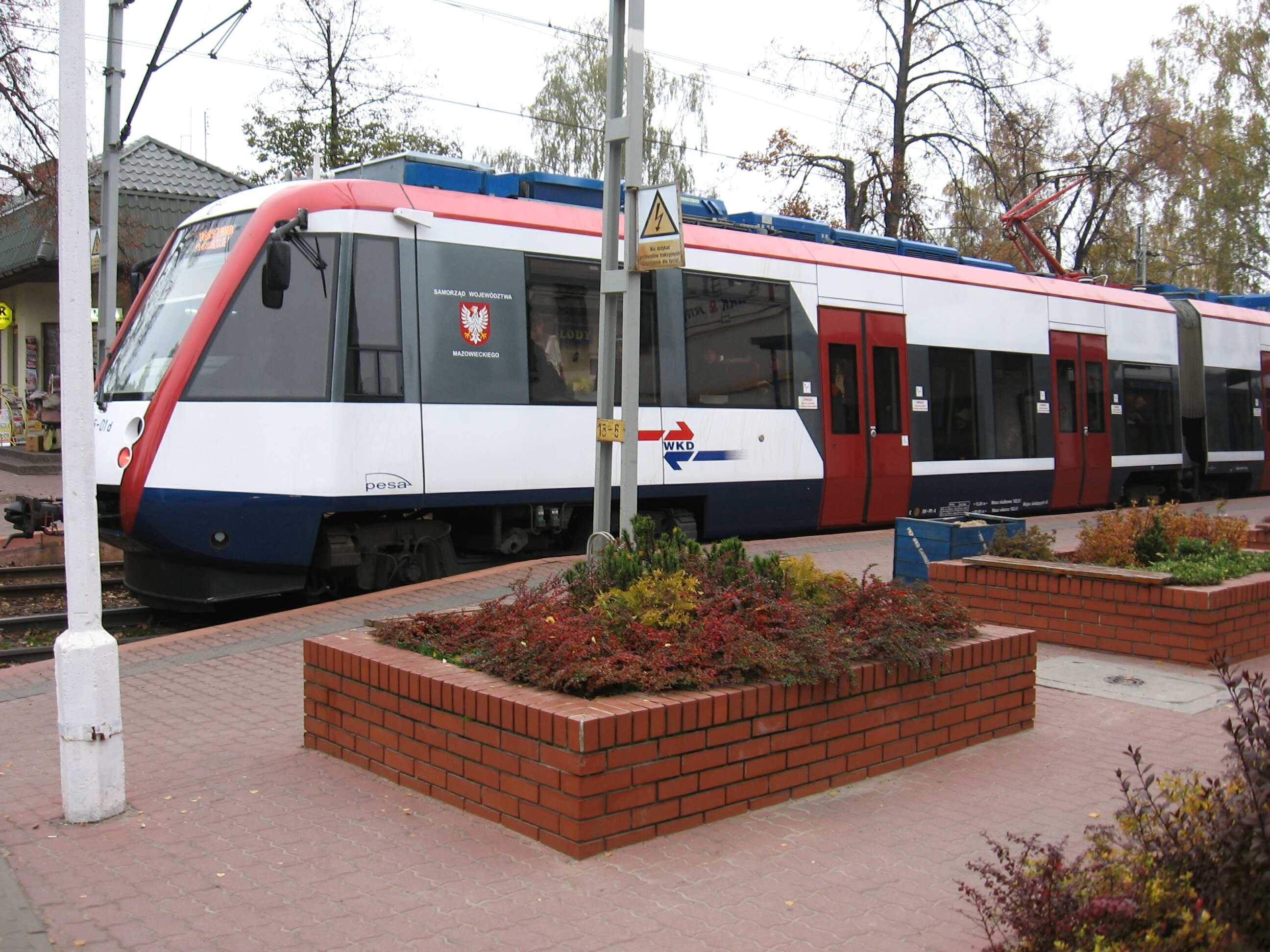 Multiple electric unit EN95 at Komorów train station